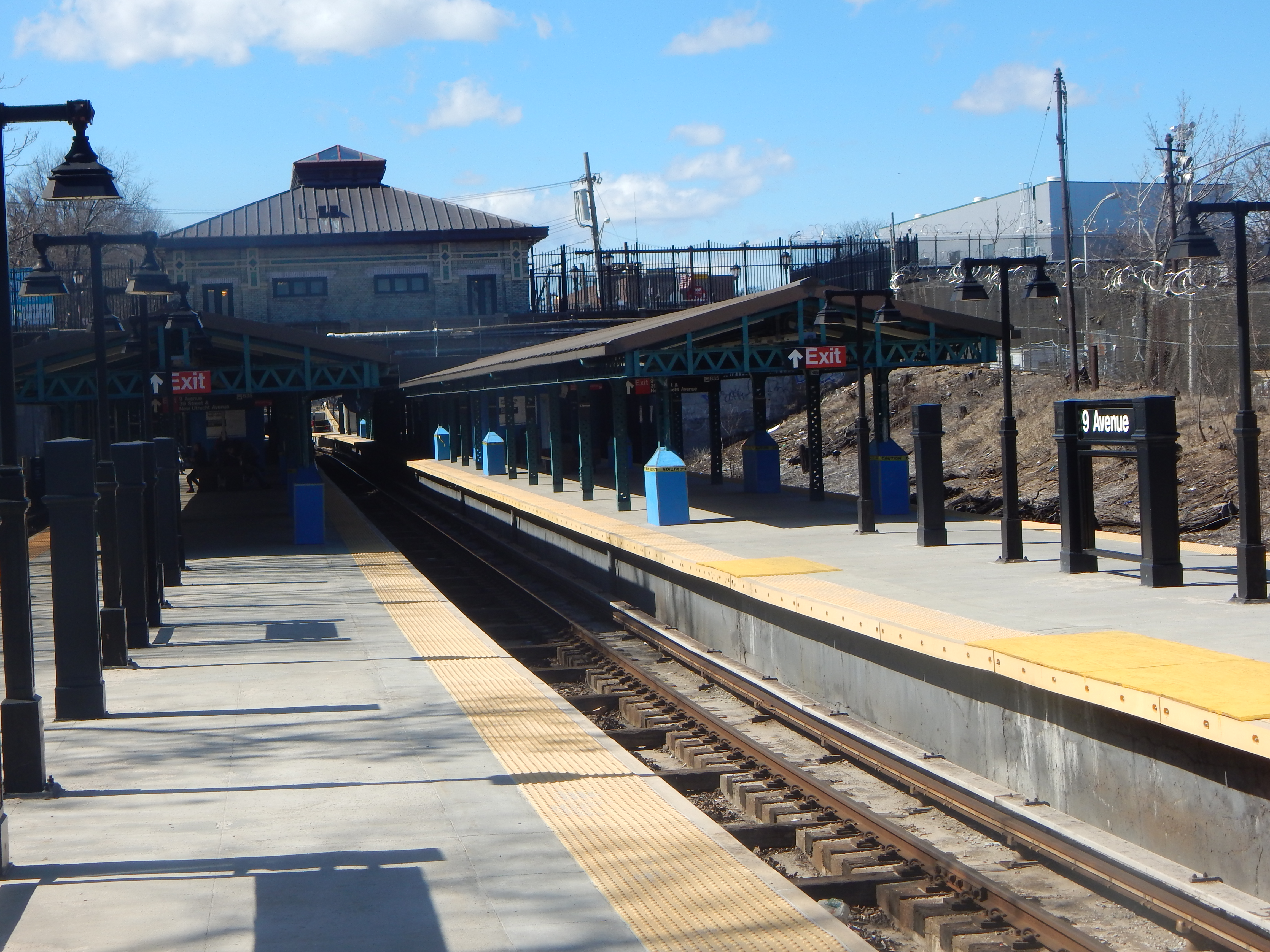 Sunset Park, Brooklyn, New York